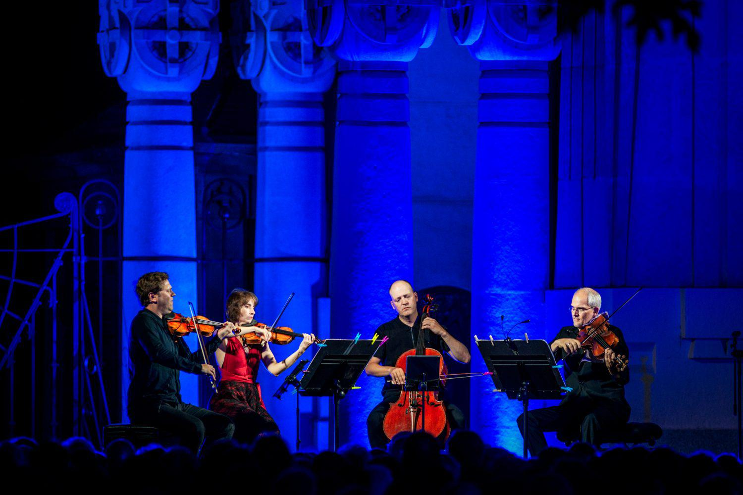 Anoche en el pórtico de la entrada principal del Cementerio de la Almudena sonaron Haydn, Beethoven y Shostakóvich a través de las cuerdas del Cuarteto Casals. Un escenario especialmente pensado para la escucha de estas piezas, recibía a las 21 horas una propuesta más de Veranos de la Villa, en colaboración con la Empresa Municipal de Servicios Funerarios y Cementerios de Madrid. Una hora antes acogía ‘Dibuja el Verano’, la inicitiva del festival comisariada por Enrique Flores que anima a los amantes de la ilustración a practicar el dibujo libre a tiempo real.